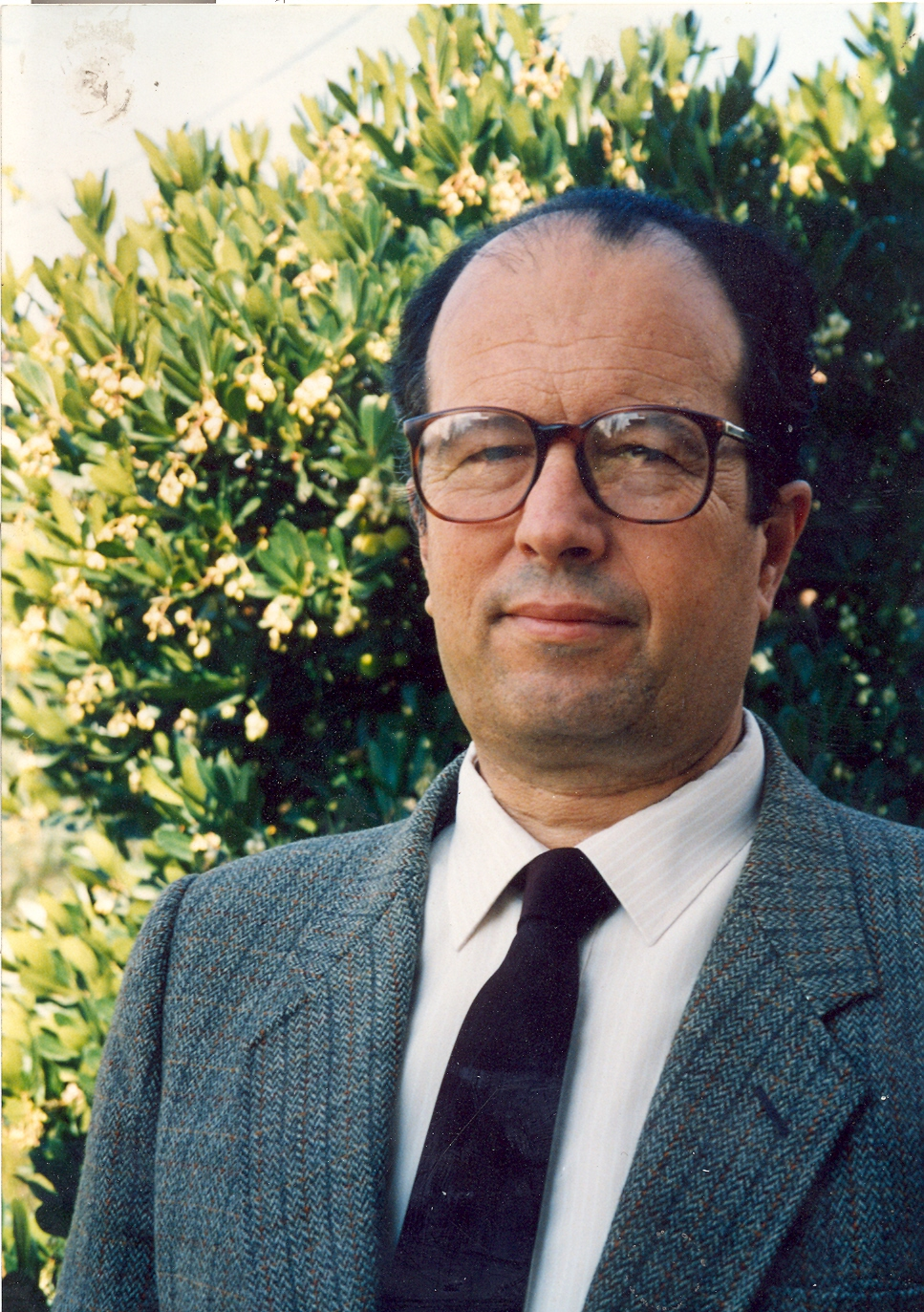 Fernando González Bernáldez, ecólogo español//spanish ecologist